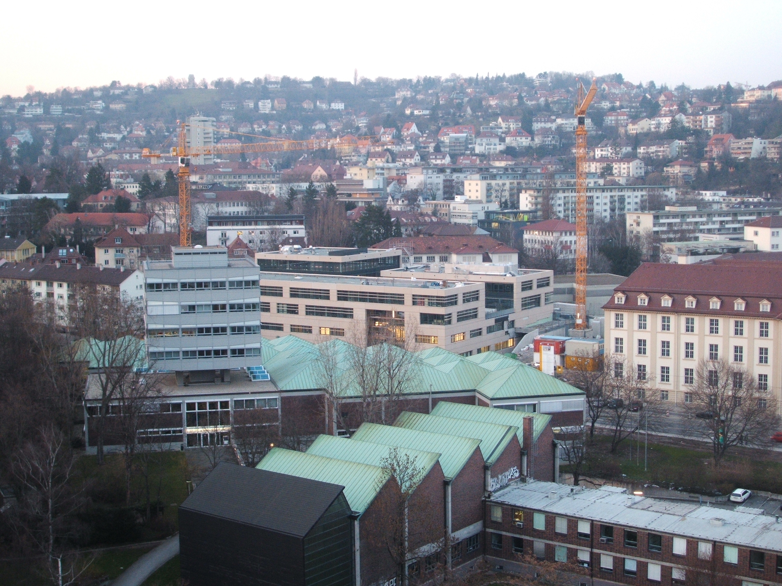 Blick vom Max-Kade-Haus Stuttgart 2007.